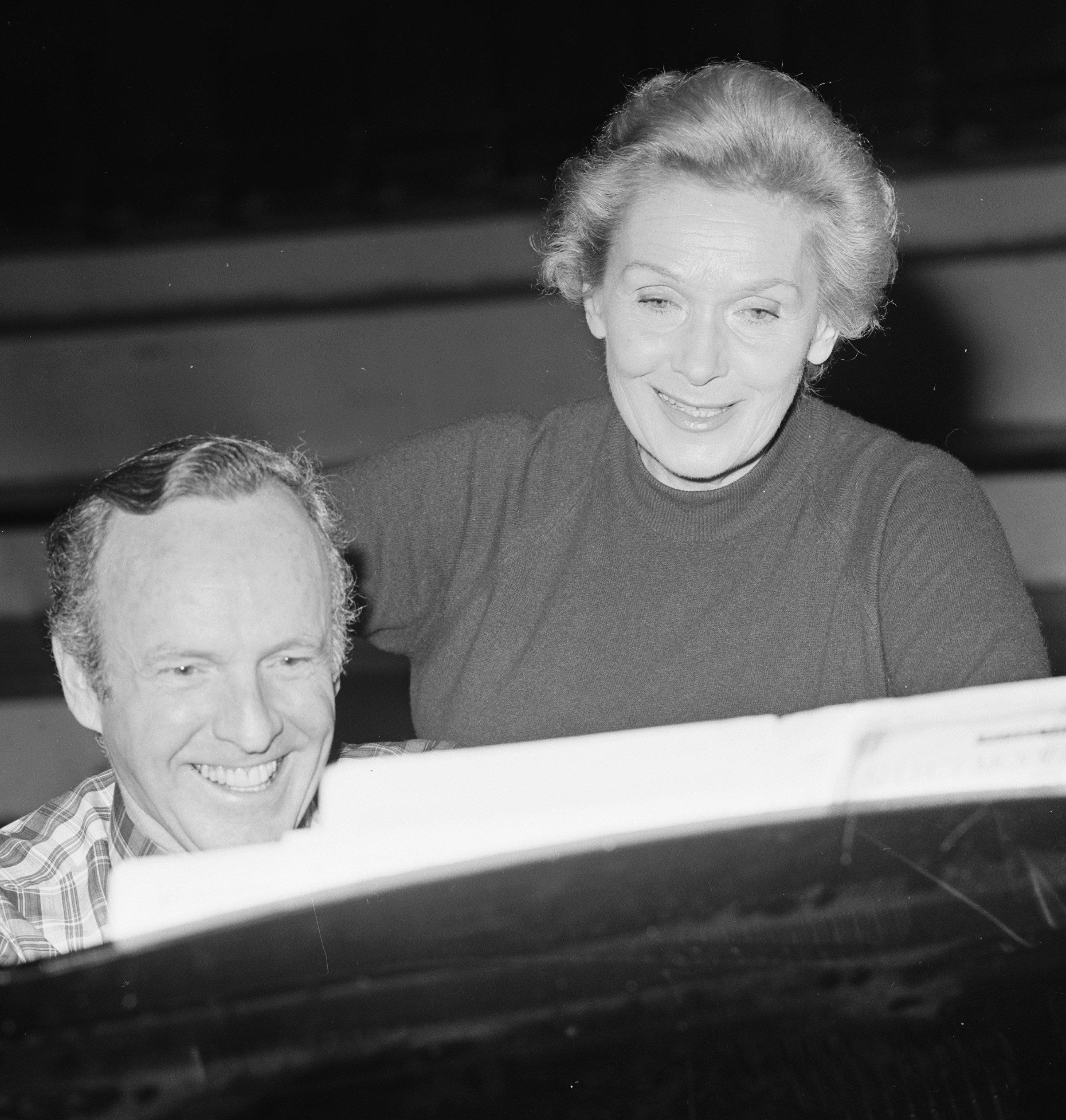 Collectie / Archief : Fotocollectie Anefo Reportage / Serie : [ onbekend ] Beschrijving : Elisabeth Schwarzkopf in Concertgebouw, Amsterdam (pianist: Geoffrey Parsons) Datum : 8 februari 1977 Locatie : Amsterdam, Noord-Holland Trefwoorden : concertzalen, muziek, piano's, recitals, zangers Persoonsnaam : Parsons, Geoffrey, Schwarzkopf, Elisabeth Fotograaf : Croes, Rob C. / Anefo Auteursrechthebbende : Nationaal Archief Materiaalsoort : Negatief (zwart/wit) Nummer archiefinventaris : bekijk toegang 2.24.01.03 Bestanddeelnummer : 929-0174